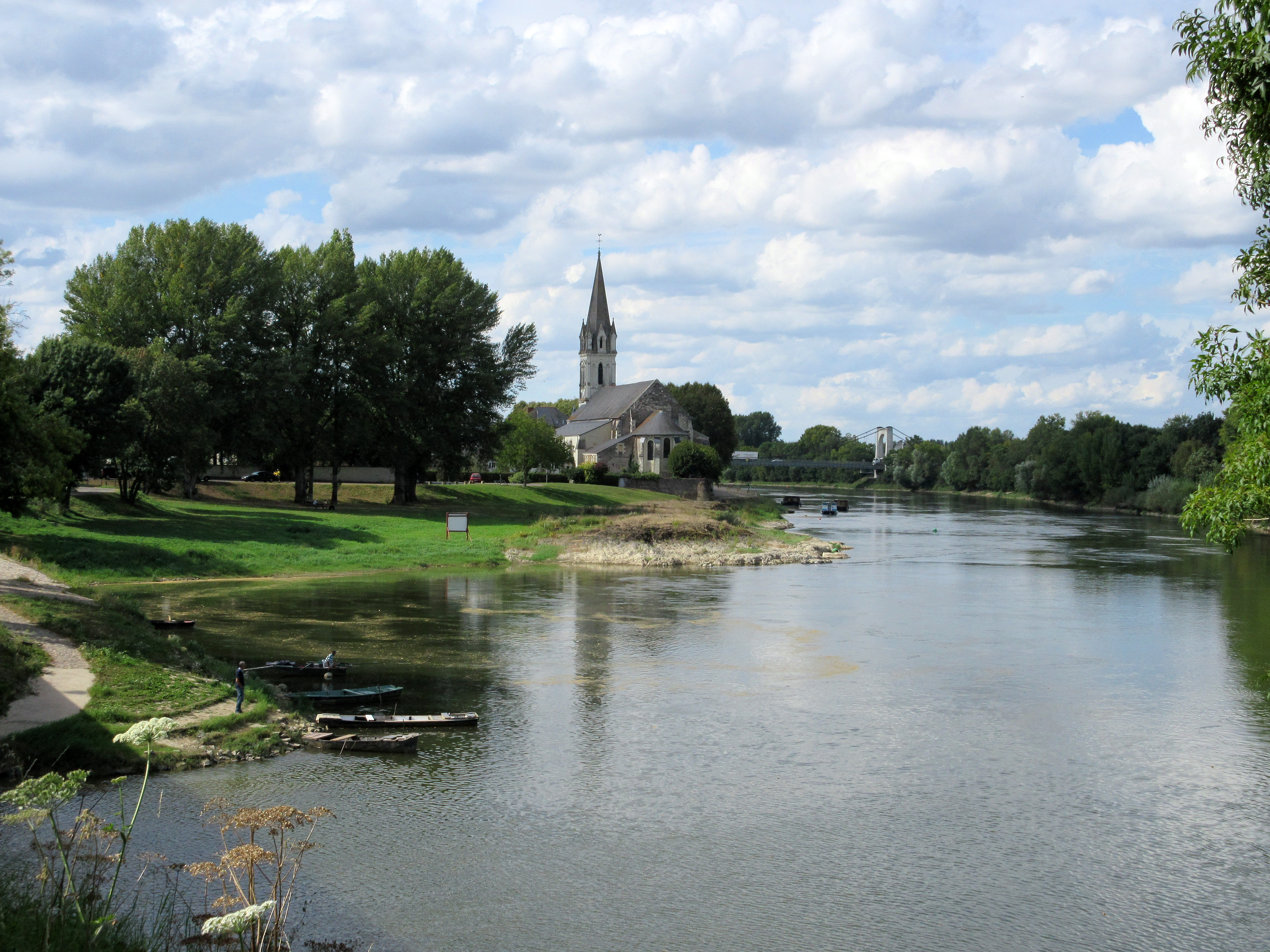 Bords de Loire à Chalonnes-sur-Loire (Maine-et-Loire, France).